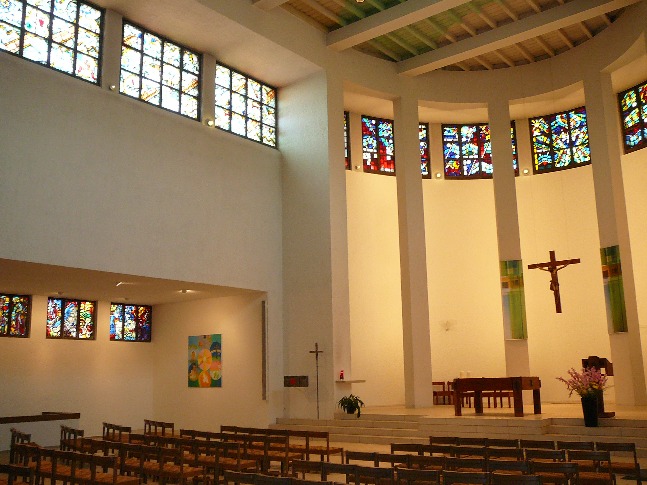 Römisch-katholische Kirche Bruder Klaus (Zürich-Unterstrass), Blick auf den Altarraum und auf das linke Seitenschiff